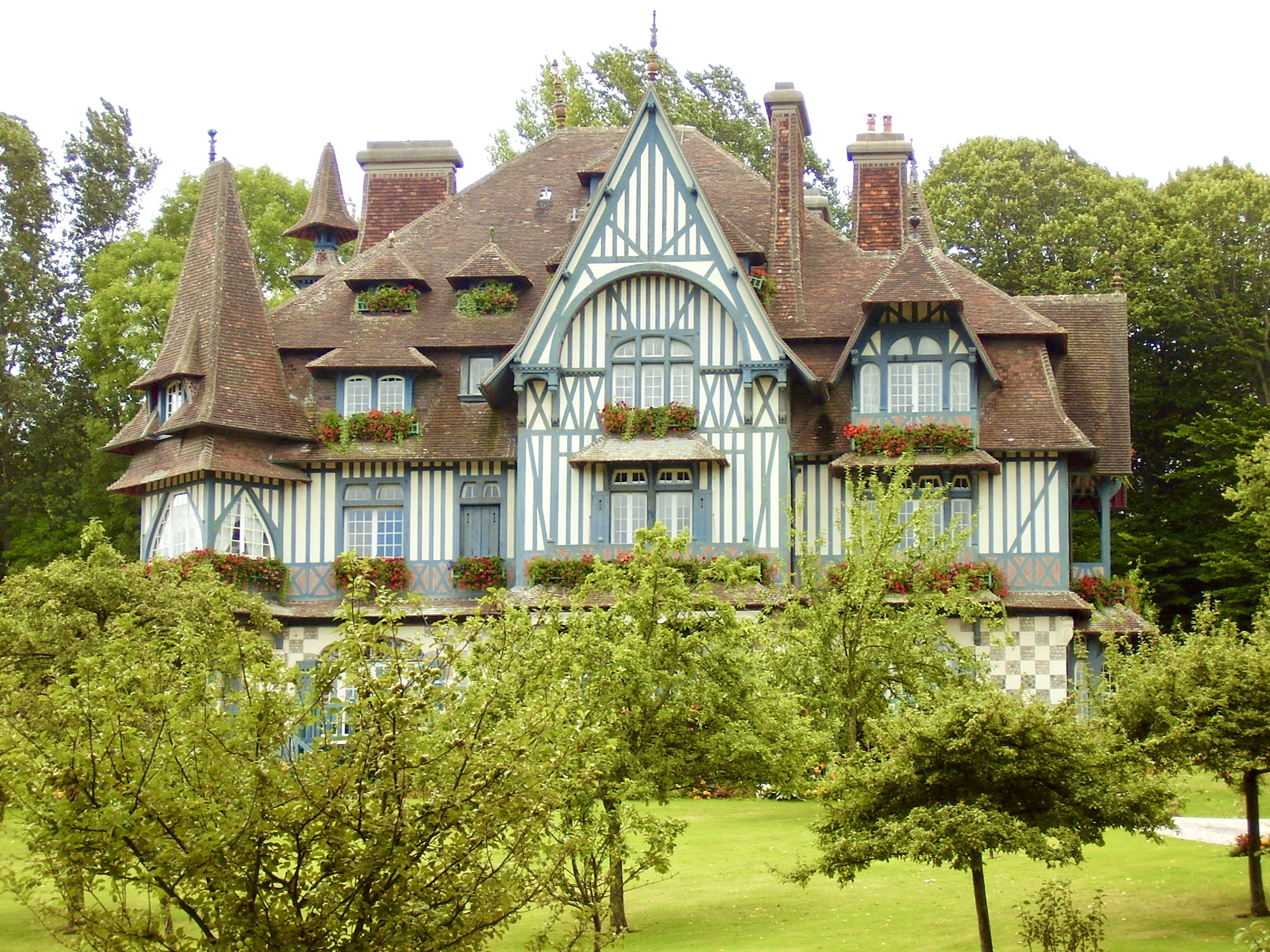 Villa Strassburger (ehemalige villa Rothschild) in Deauville (Calvados, Frankreich)